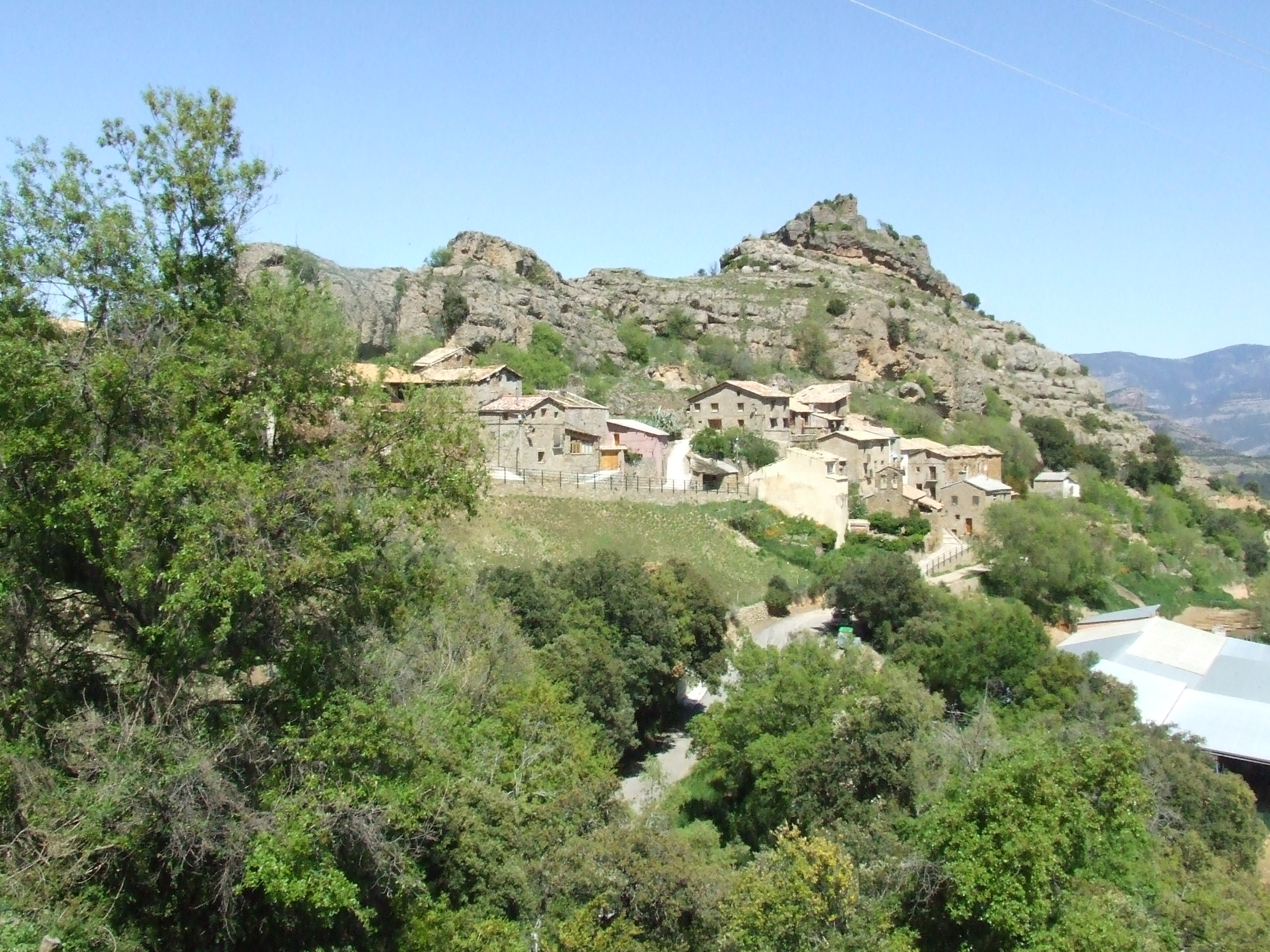 Toralla. Vista general (Toralla i Serradell, Conca de Dalt, Pallars Jussà)